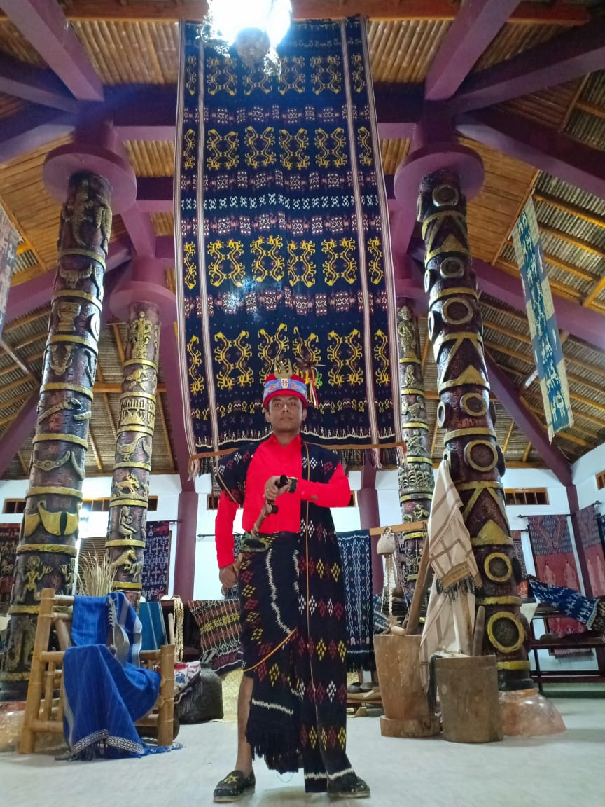 Saya mengenakan pakaian adat Sumba dari kain tenun Ikat Kodi. Lokasi foto saya di museum Atma Hondu, Rumah Budaya Sumba, SBD, NTT. Ditenun dengan ketulusan agar dikenakan dengan penuh kebanggaan. Terima kasih para mama penenun yang telah mengIKAT cinta di setiap benang yang terbentang indah pada selembar kain.